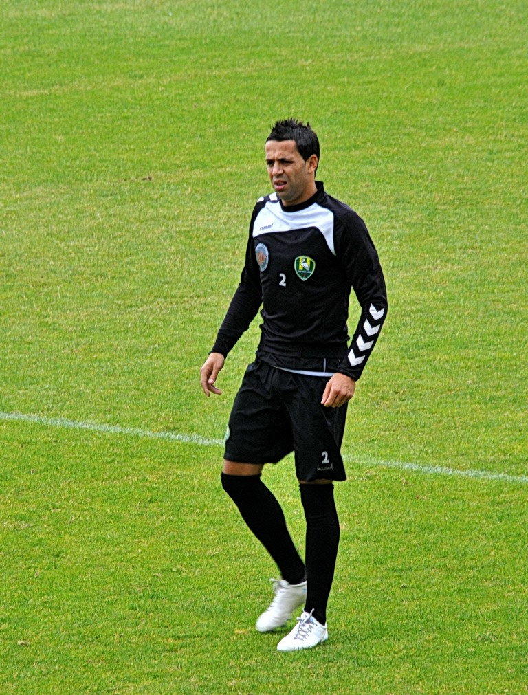 Ahmed Ammi. Verdediger (30).